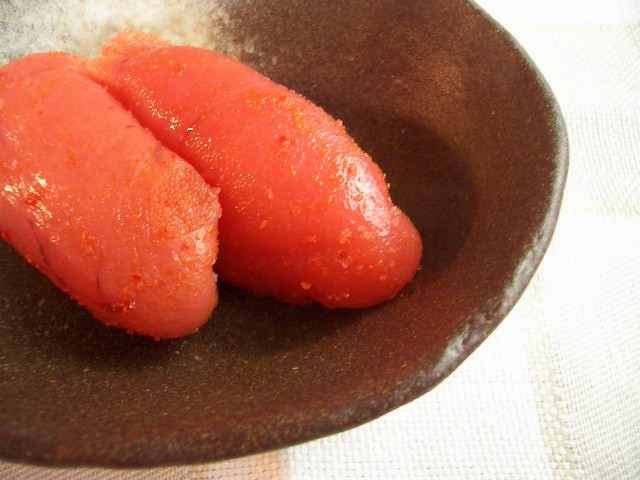 ご飯のお供に(^-^)